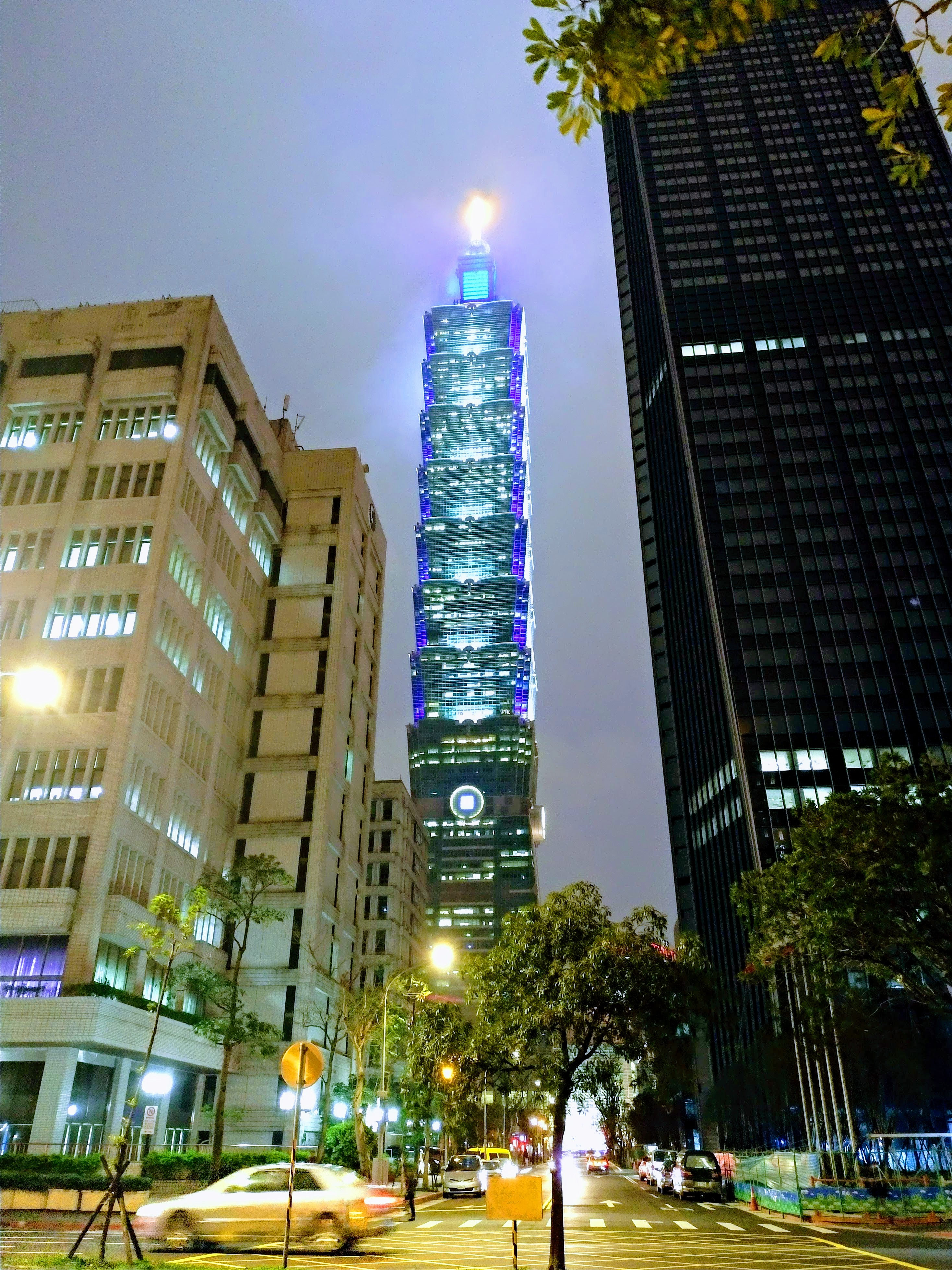 台北101外觀夜景燈光-2018年三月拍攝(星期五)